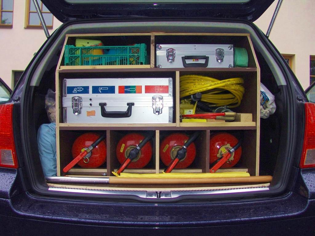 Die Ausrüstung eines Rallye S-Wagens